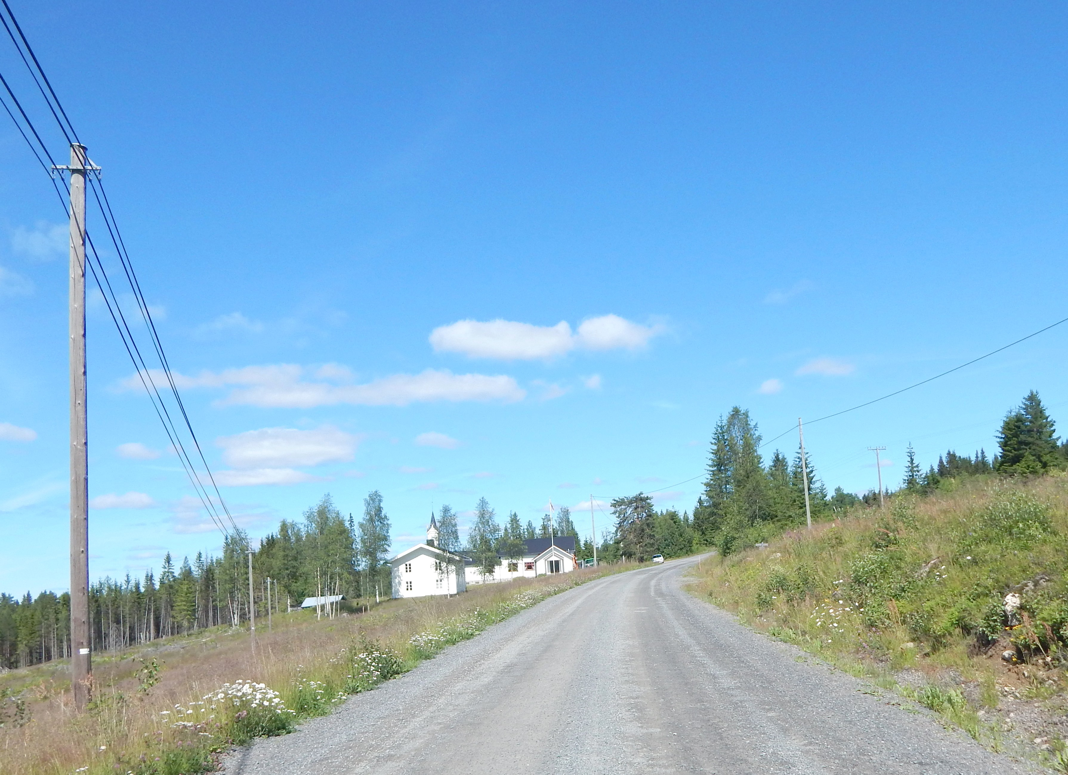 Fylkesvei 493 går forbi Risberget kirkesal.